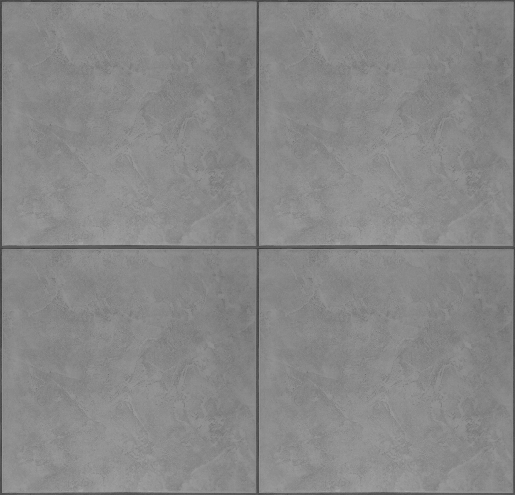 Obrázek pro použití jako bump mapa.